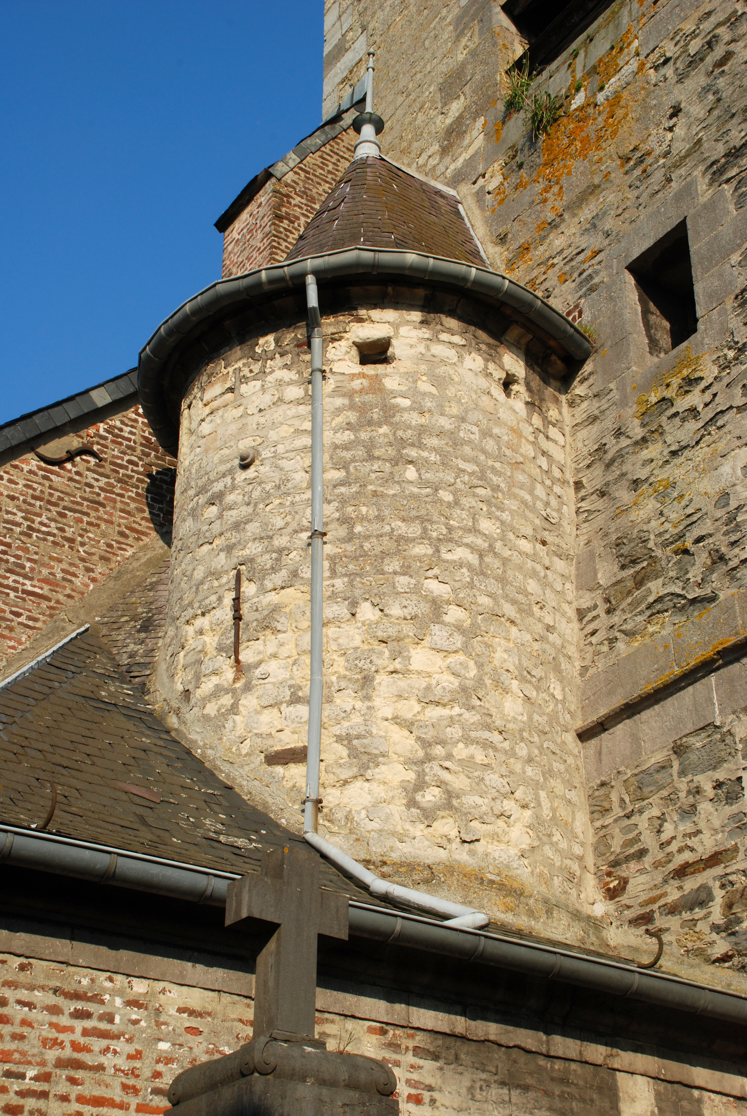 Belgique - Wallonie - Brabant wallon - Église de Court-Saint-Étienne